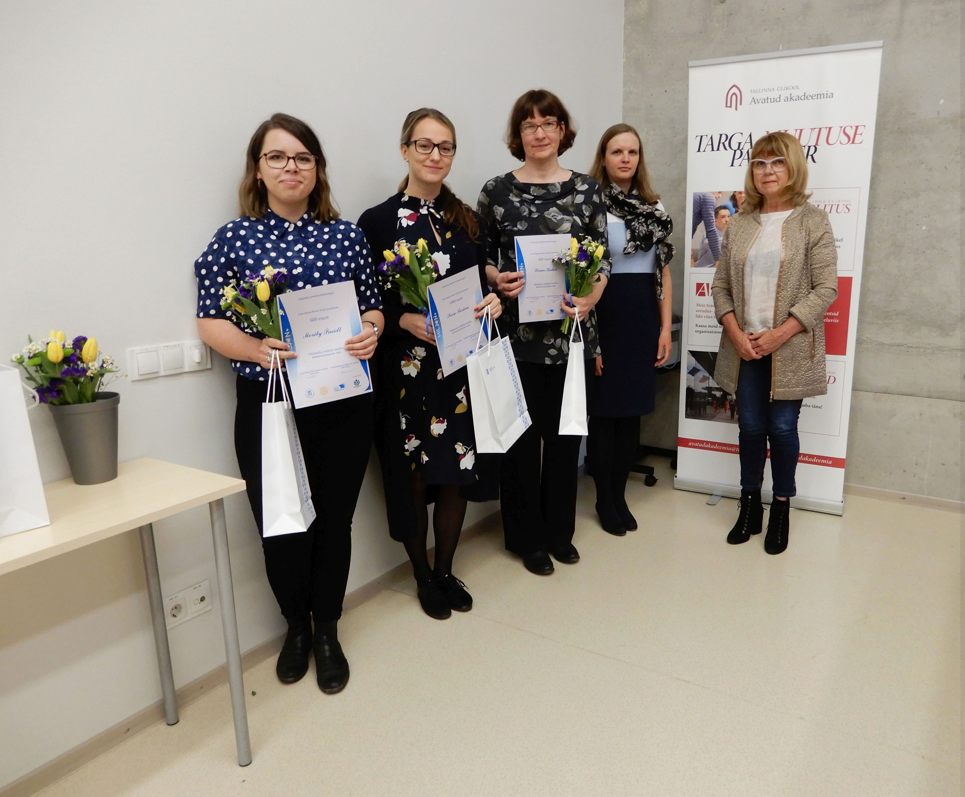 Keeletoimetamistalgute parimate auhindamine 04.05.19 TLÜ-s. Vasakult Merily Šmidt (II koht, TÜ), Svea Tarkin (I koht, TÜ), Liina Kahu (III koht), Ann Siiman (žürii esimees, TÜ), Sirje Ginter (Tartu Hansa Rotary Klubi president). Foto autor Tiina Sammelselg.